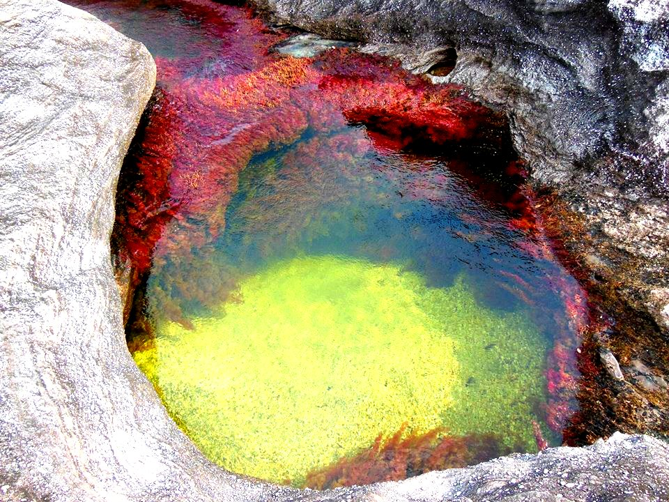 Esta fotografía fue tomada en el municipio colombiano con código 50350.